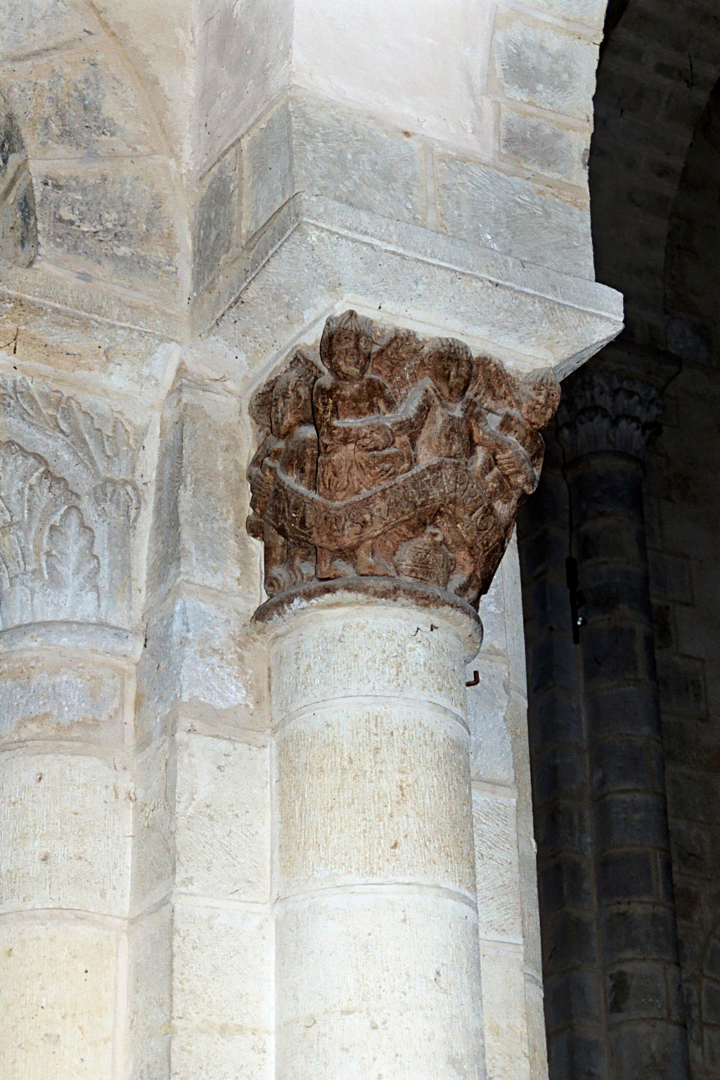 France - Auvergne - Collégiale Saint-Victor et Sainte-Couronne d'Ennezat